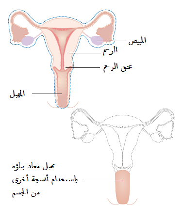 استئصال جذري للرحم لعلاج سرطان المهبل مع إعادة بناء المهبل باستخدام أنسجة أخرى